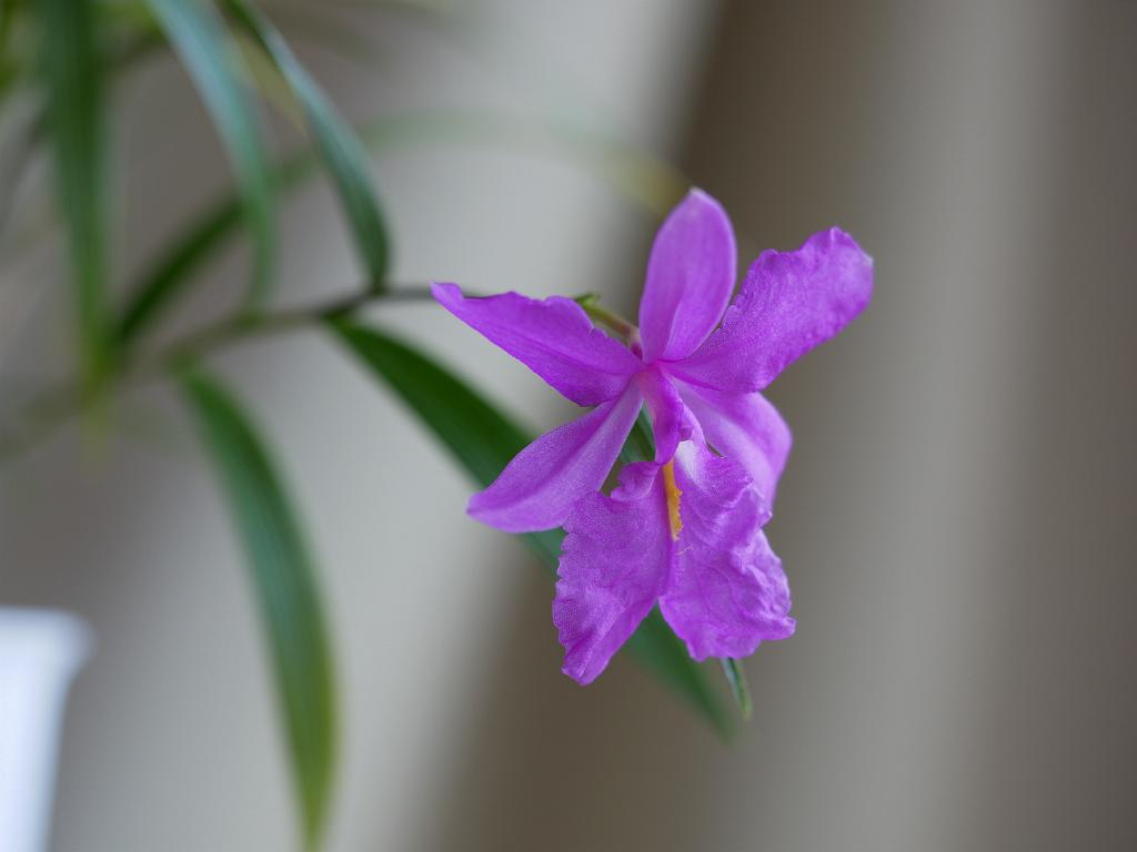 2019/05/18 栽培下